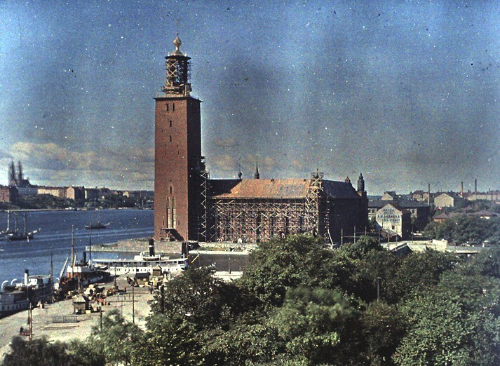 Gustaf W. Cronquist, Stockholms stadshus under byggnad 1921